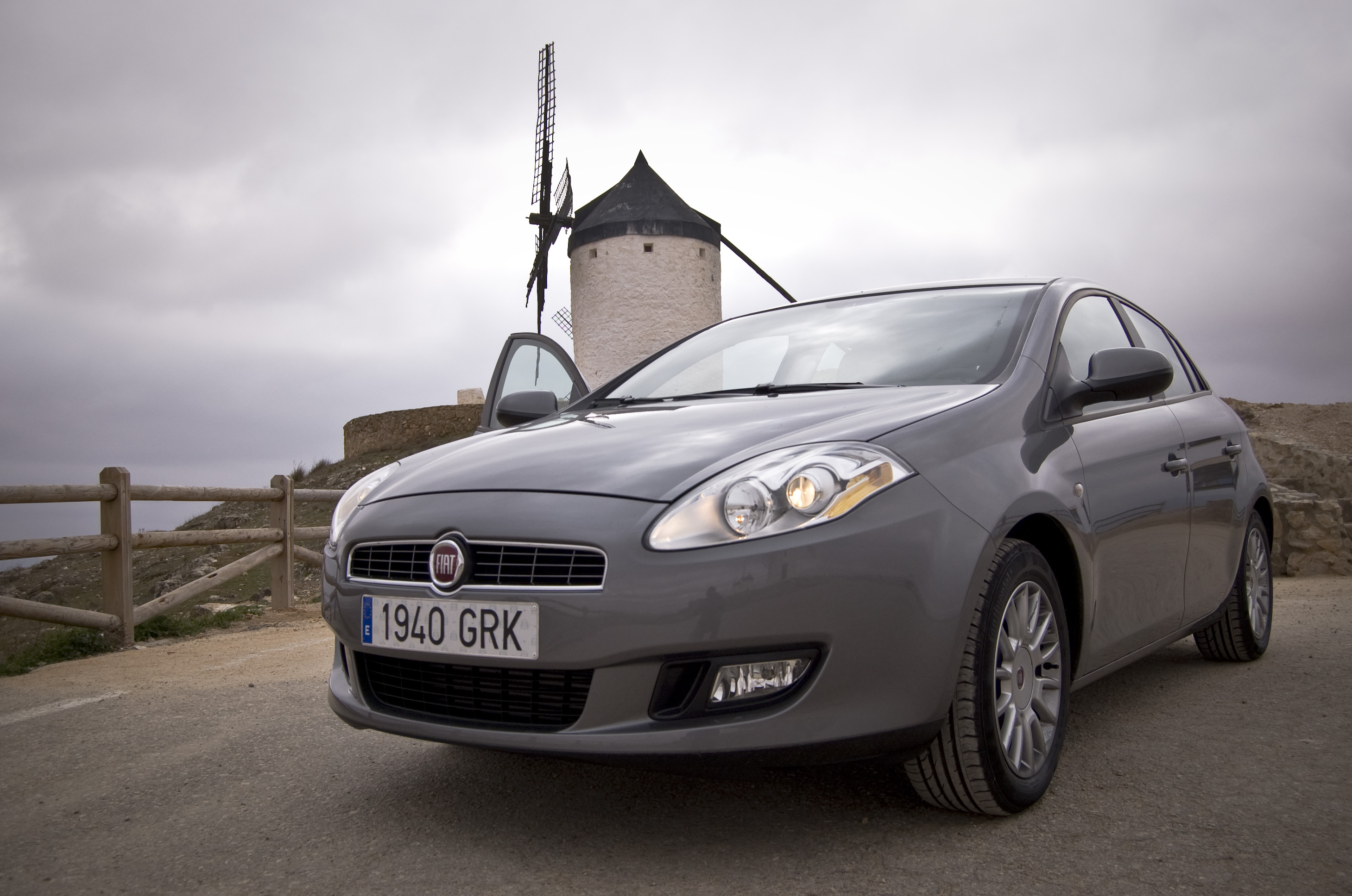 Fiat Bravo prueba y "photoshoot" en los molinos de viento de Consuegra (Toledo). Prueba en Diariomotor